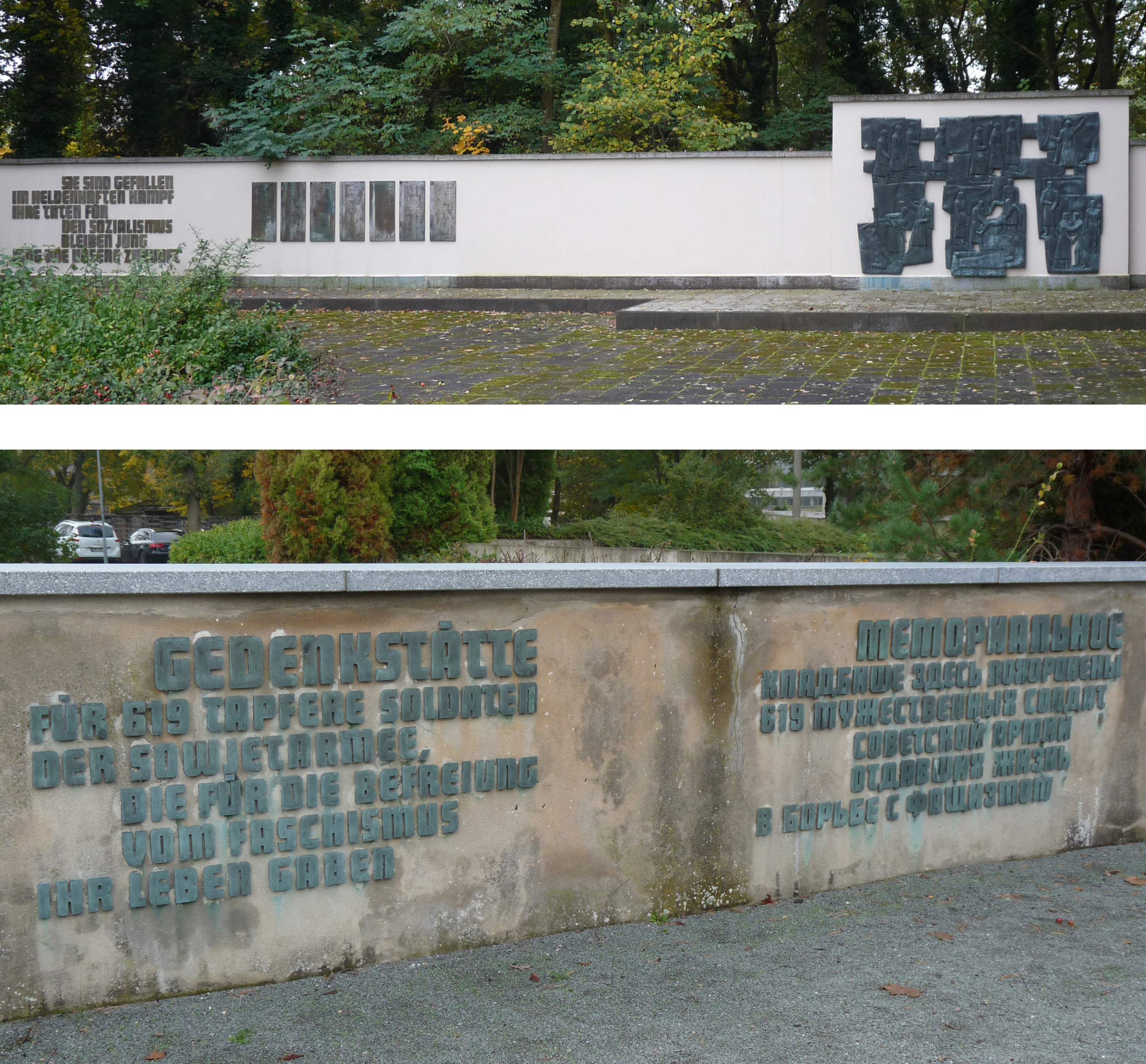 Ehrenmal an der Berliner Chaussee